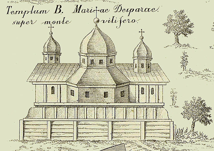 Templum B. Mariae Decparae super monte vitifero («Храм Різдва Богородиці Марії на горі виноградній»). План Ближніх і Дальніх печер (1674) Інокентія Ґізеля